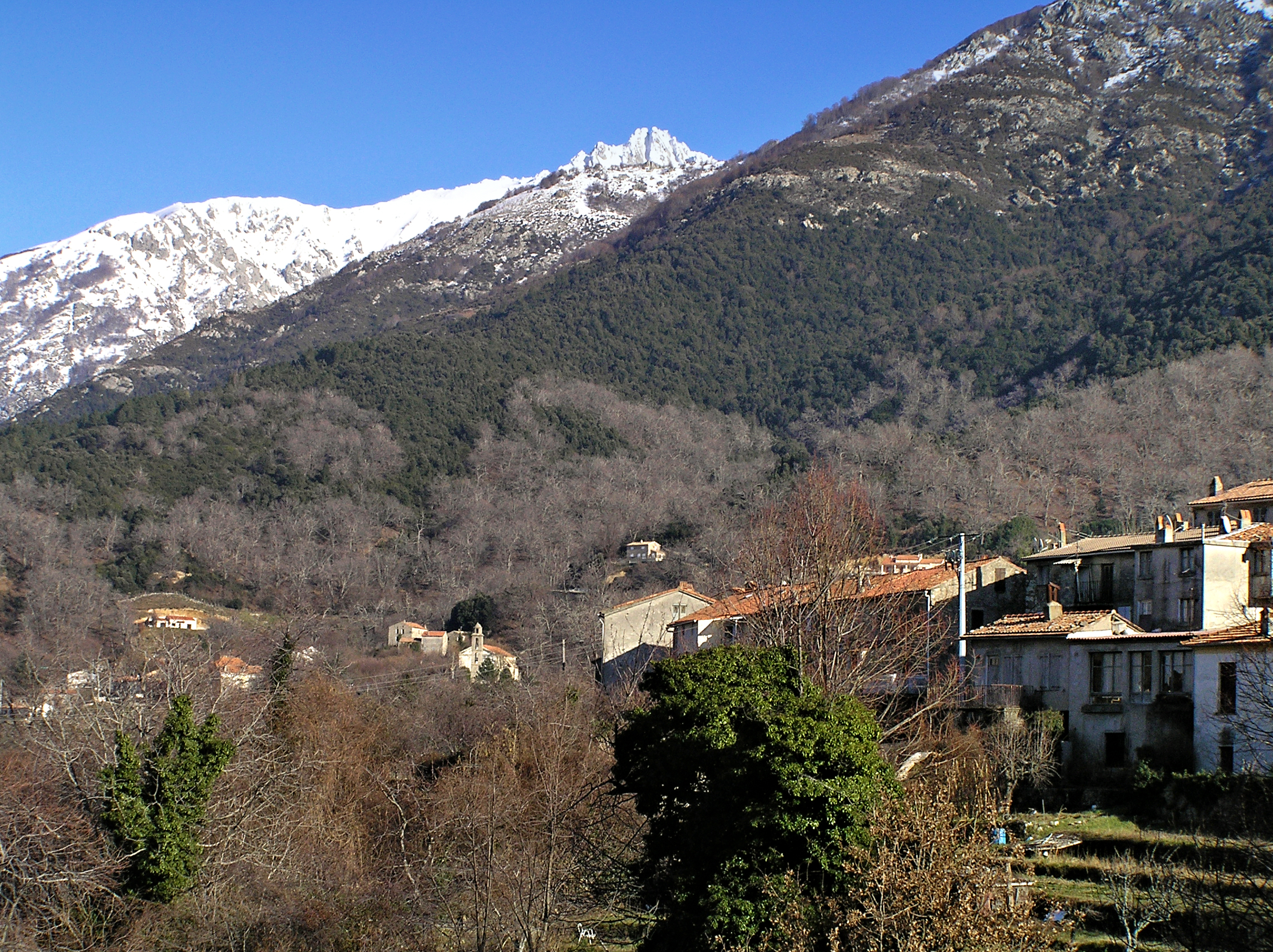 Bocognano (Corse) - Vue d'une partie du village